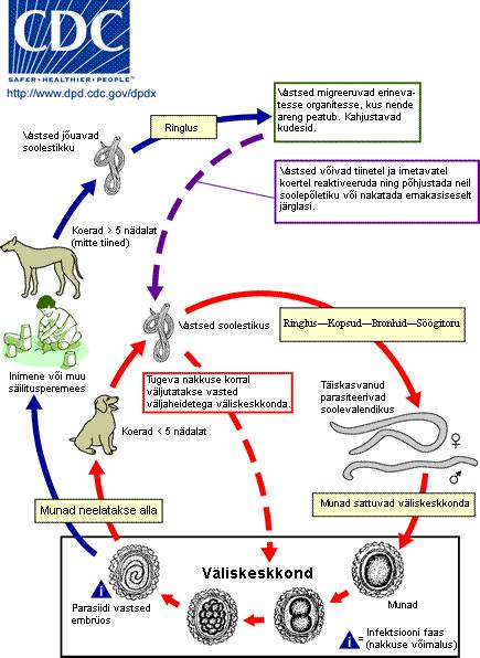 Eestikeelne versioon Toxocara canis´e elutsüklist